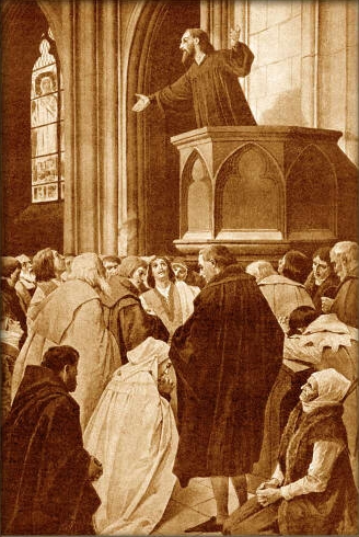 Věnceslav Černý (1865-1936) - Mistr Jan Hus káže v kapli Betlémské